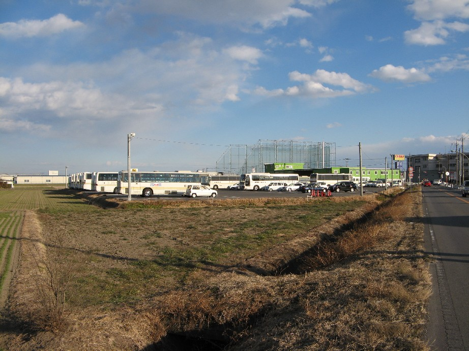 日本中央バス本社建物裏にある車庫。